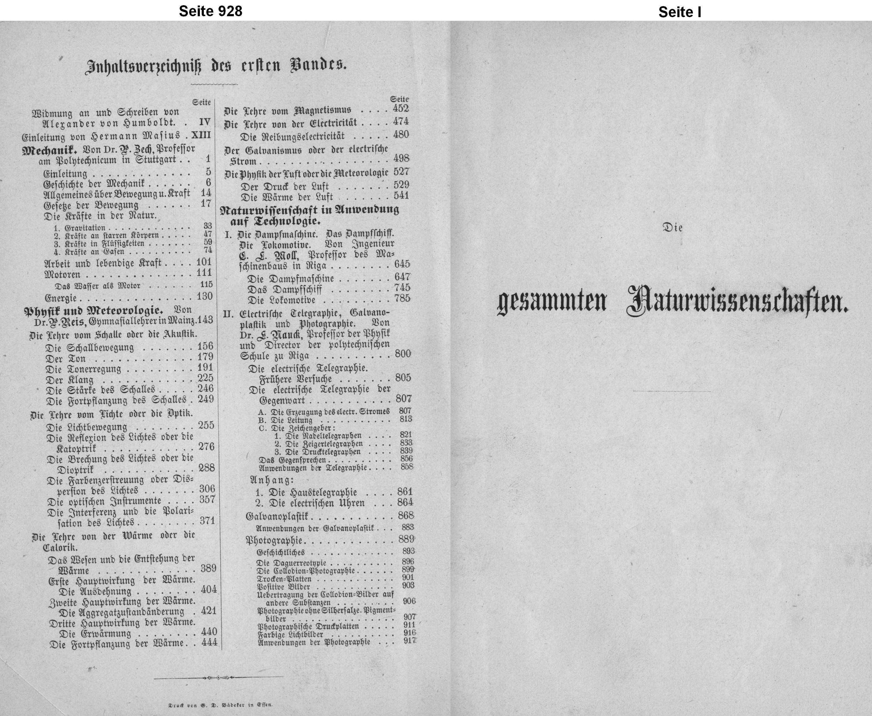 Seiten I und 928